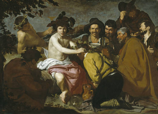 La obra, titulada El triunfo de Baco o Los Borrachos, es una de las obras mitológicas más conocidas del pintor sevillano Diego Velázquez.